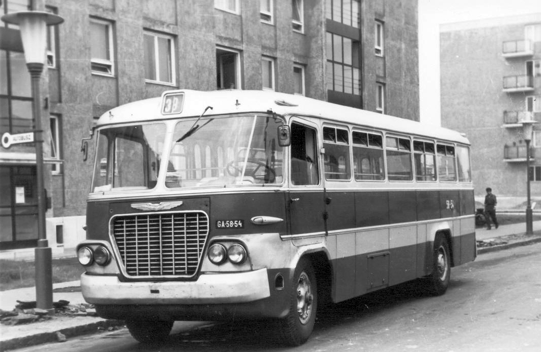 Lobogó utca, a 39-es busz végállomása. Location: Hungary, Budapest IX. Tags: number plate, Ikarus-brand, Hungarian brand, bus, Budapest Title: Lobogó utca, a 39-es busz végállomása.